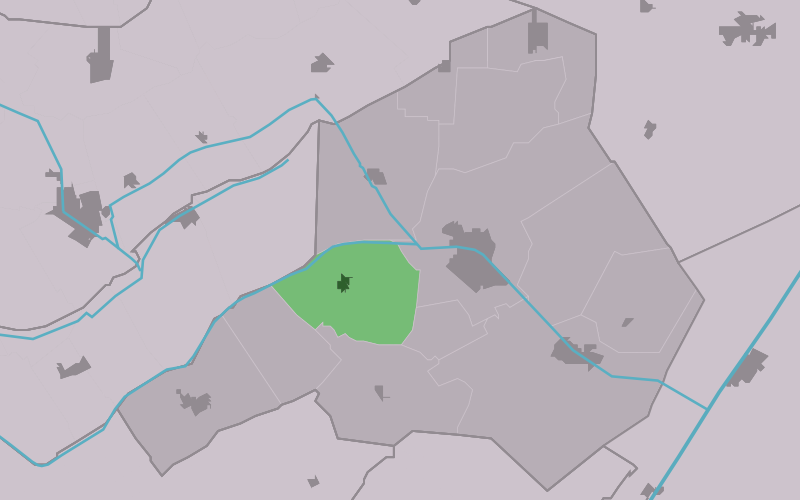 Kaartsje fan himrik fan Makkingea